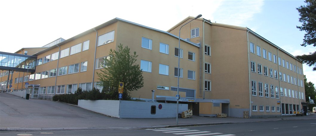 Savon ammatti- ja aikuisopiston päätoimipistettä Kuopion Haapaniemellä: Presidentinkatu 1:n rakennusta kadulta päin.